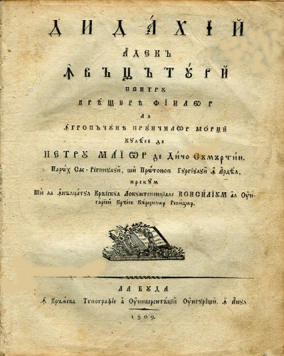 Petru Maior - Prima pagină din Didahii, adecă învăţături pentru creşterea fiilor, la îngropăciunea pruncilor morţi, culese de Petru Maior de(n) Dicio Samartin. La Buda. În Crăiasca Tipografie a Universităţii Ungureşti. În anul 1809., publicată la Buda în 1809.